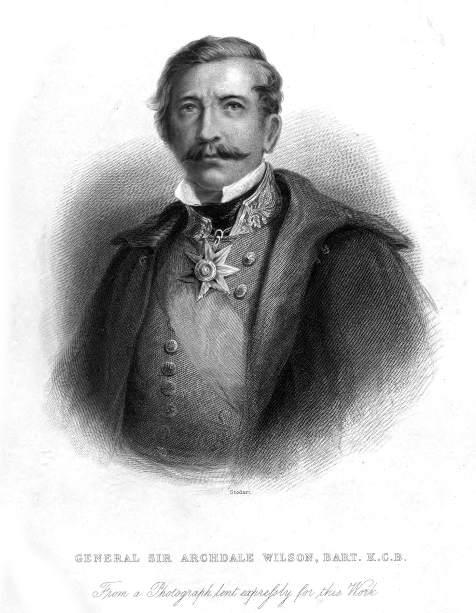 Sir Archdale Wilson, 1st Baronet (1803-1874)